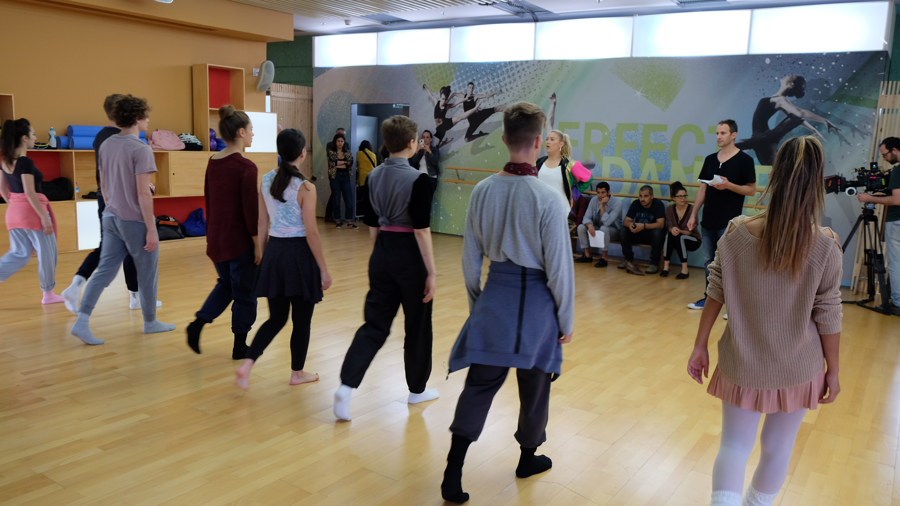 תצלום מתוך סדרת הטלוויזיה דאנסטורי